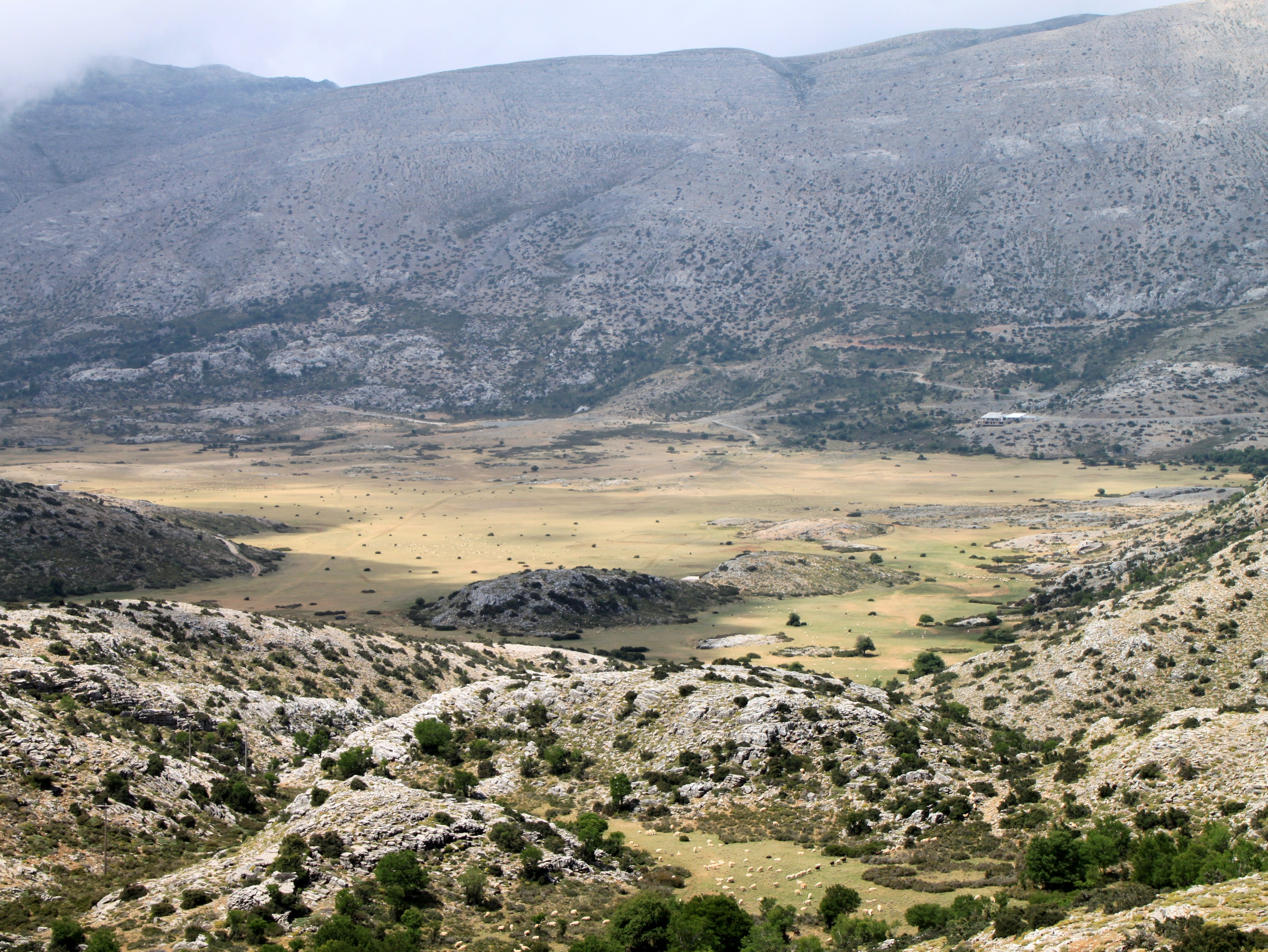 Nida-Hochebene, Gemeinde Anogia, Präfektur Rethymno, Kreta, Griechenland